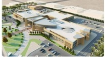 مبنى الجامعة العربية المفتوحة بالسعودية